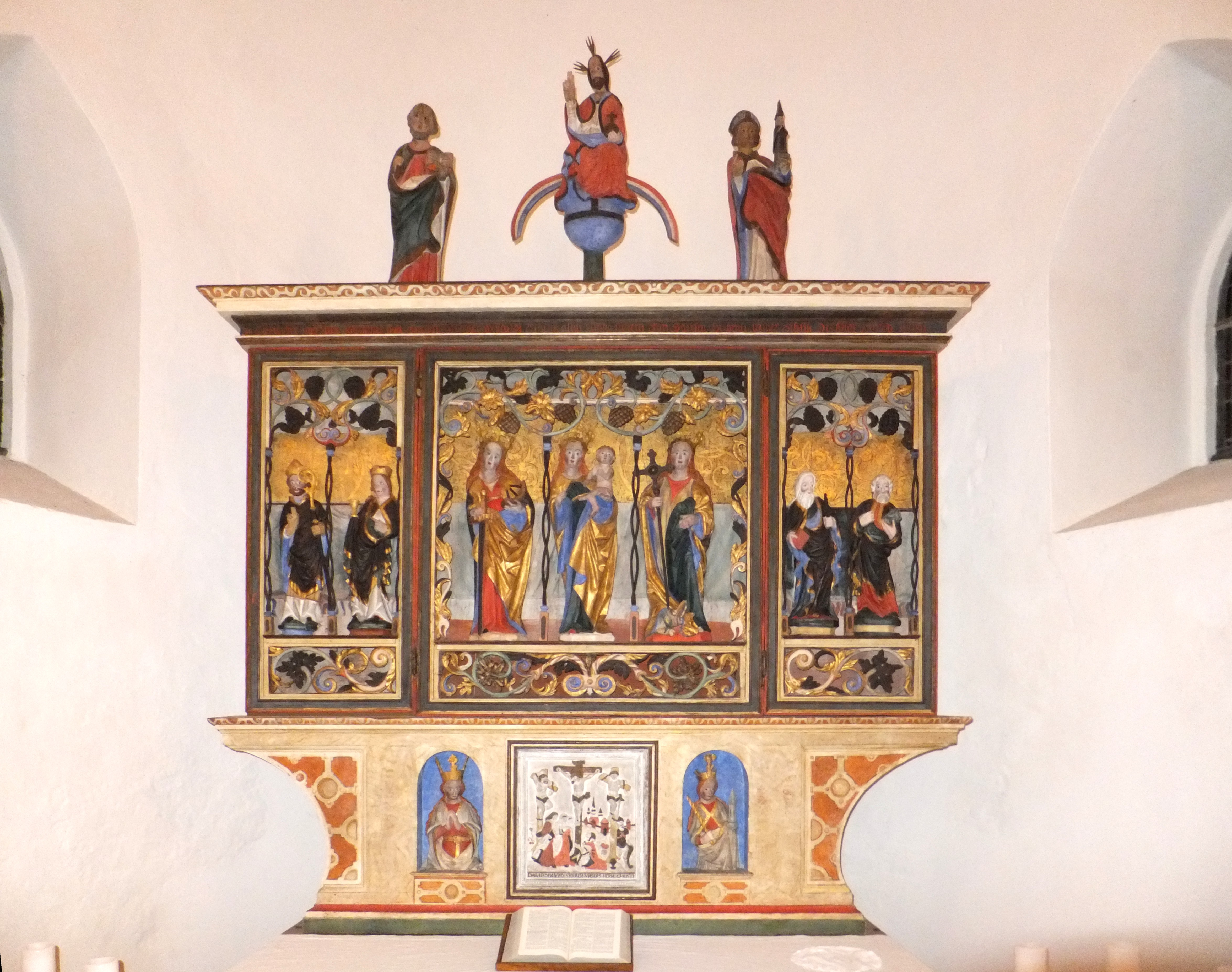 Dorfkirche Schwanebeck: Altar